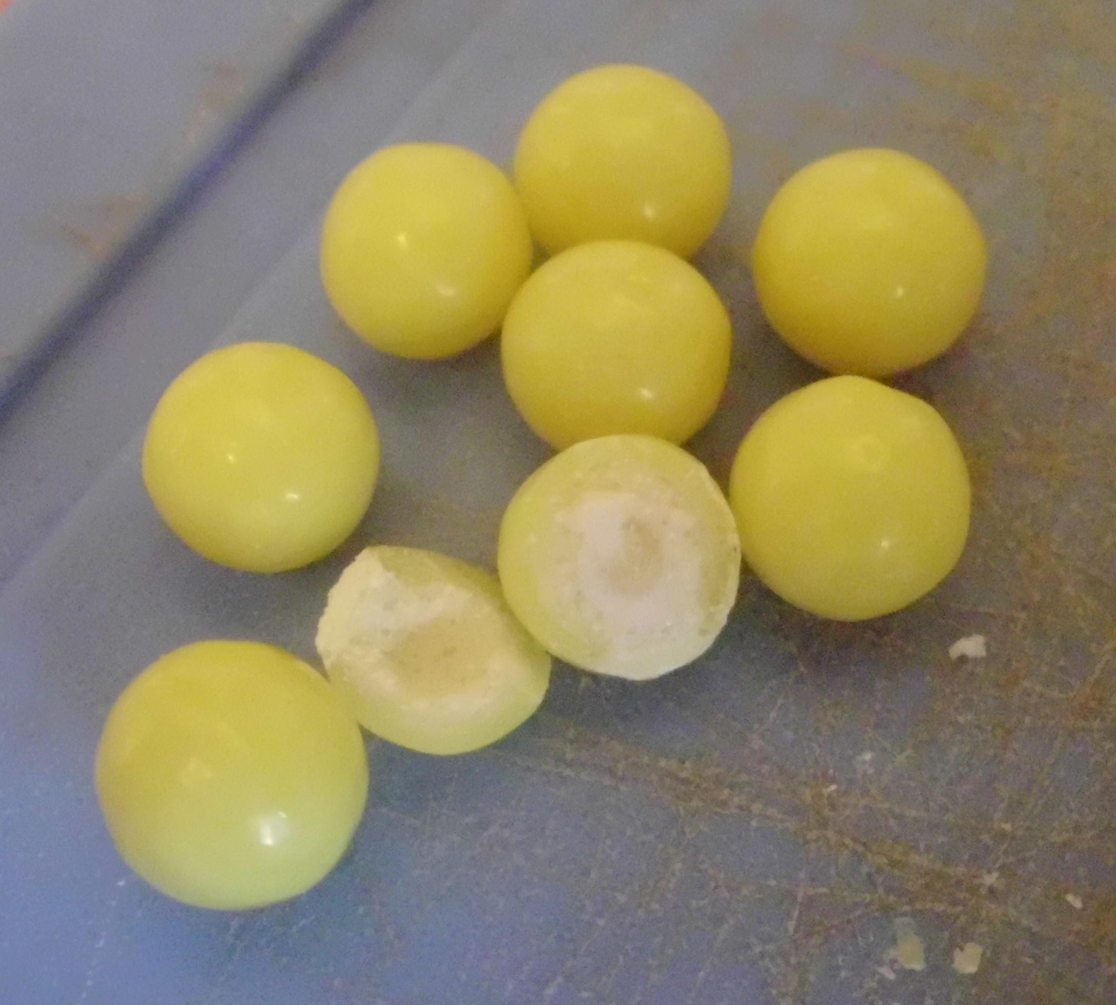 Драже с аскорбиновой кислотой. На сколе драже видна слоистая структура.